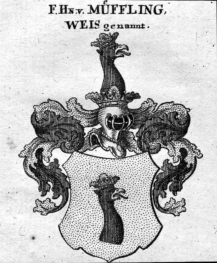 Wappen der deutschen Adelsfamilie "von Müffling, genannt Weiß"